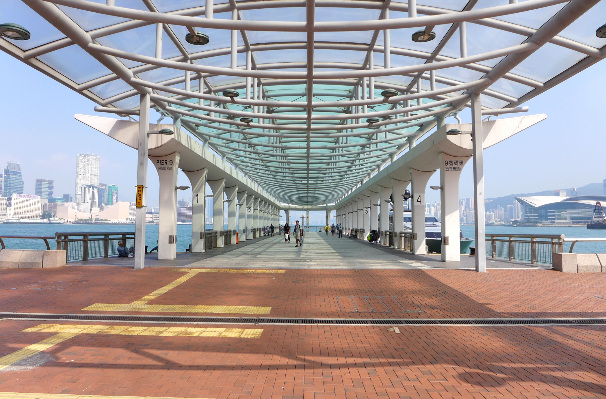 Central Pier 9